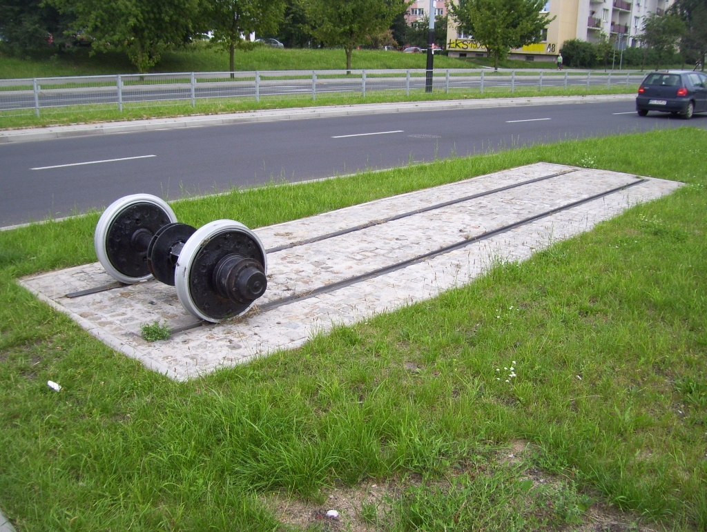 Pomnik "ośka" upamiętniający pierwszą linię tramwajową na Retkini – ufundowany przez Klub Miłośników Starych Tramwajów w Łodzi we współpracy m.in. z MPK Łódź. Pomnik wystawiony przez Klub Miłośników Starych Tramwajów w Łodzi (we współpracy m.in. z MPK Łódź) upamiętniający linię tramwajową na ulicy Retkińskiej (1955-1978).